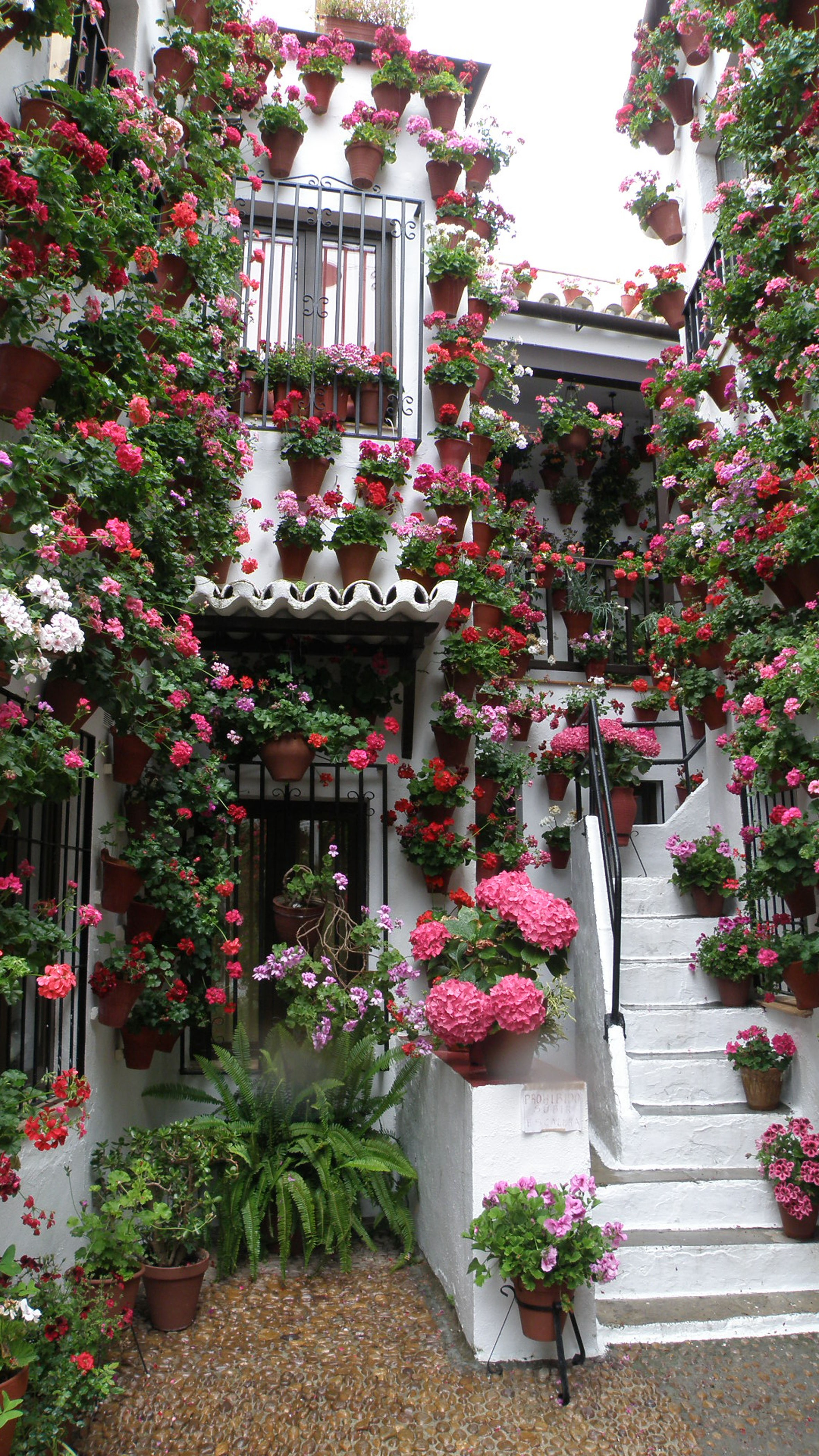 Patio de Córdoba (España).